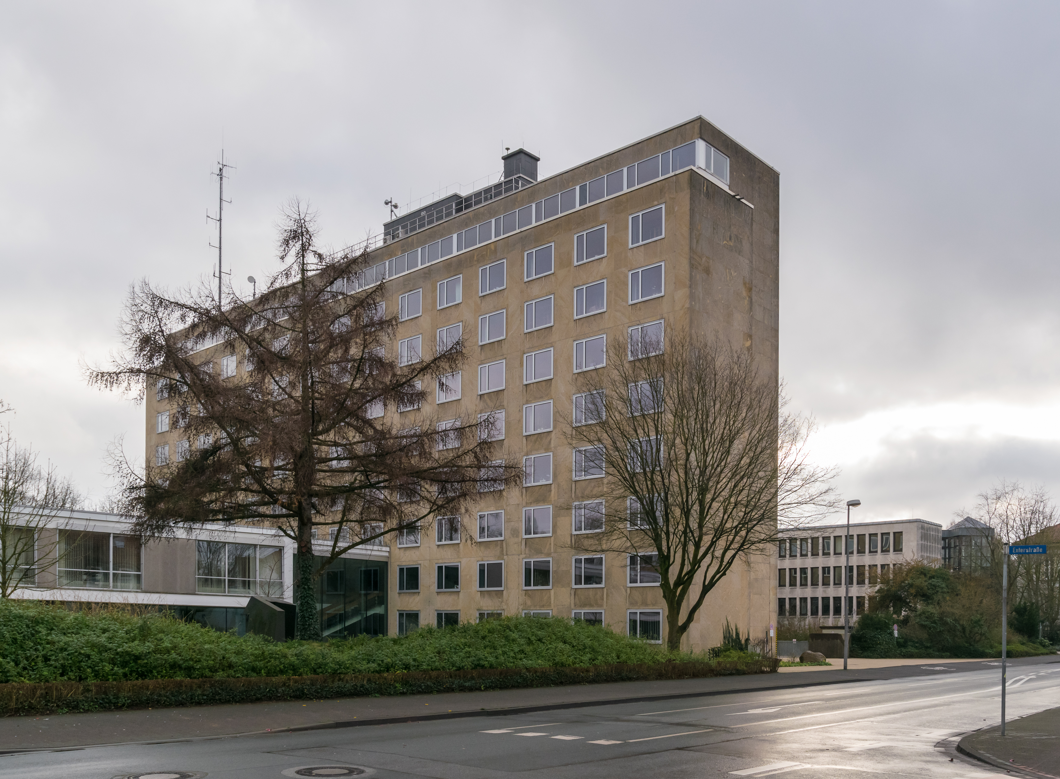 Sitz der Bezirksregierung Detmold